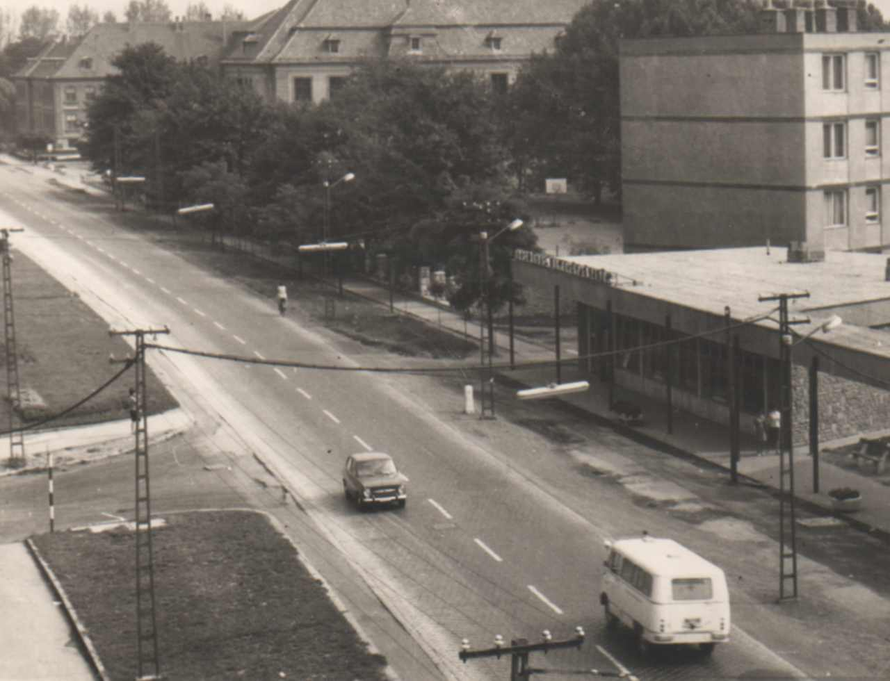 Az 1-es főút az 1960-as években Komáromnál